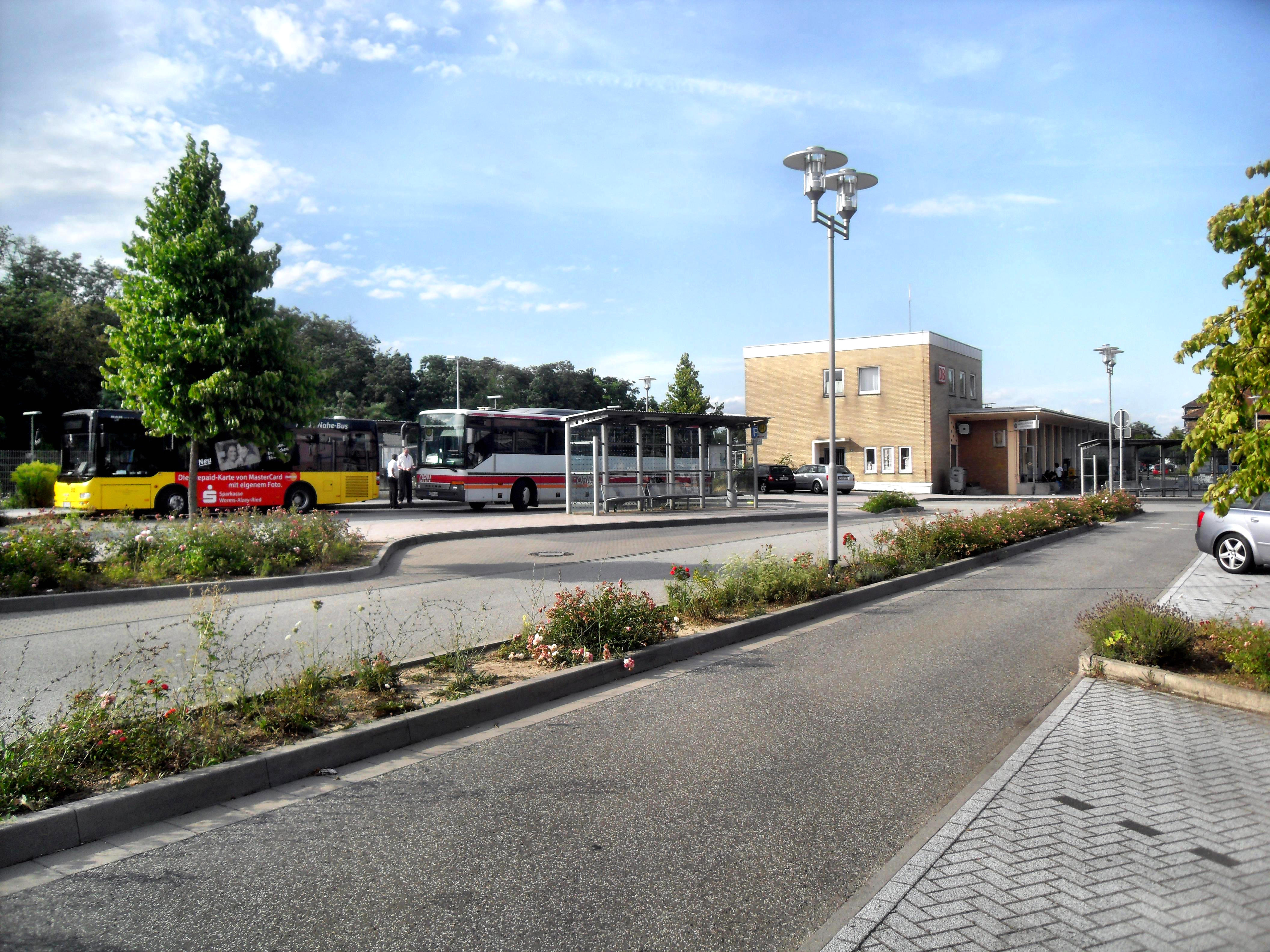 Der Alzeyer Busbahnhof in der Nähe des Bahnhofs Alzey in Rheinhessen (Deutschland)